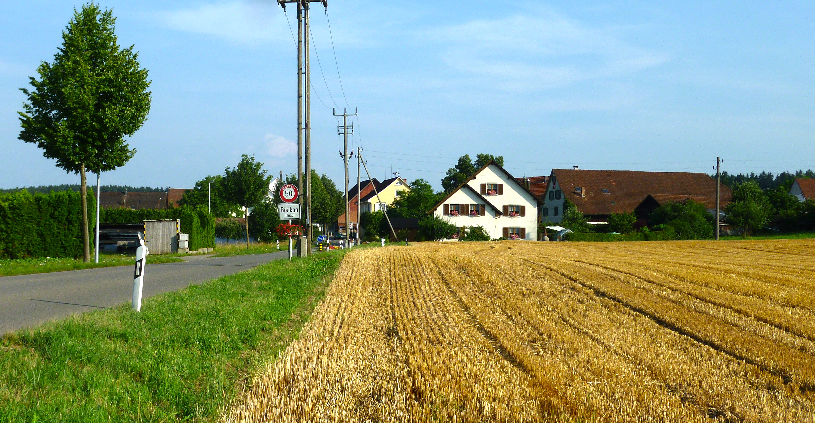 Bisikon bei Efretikon ZH